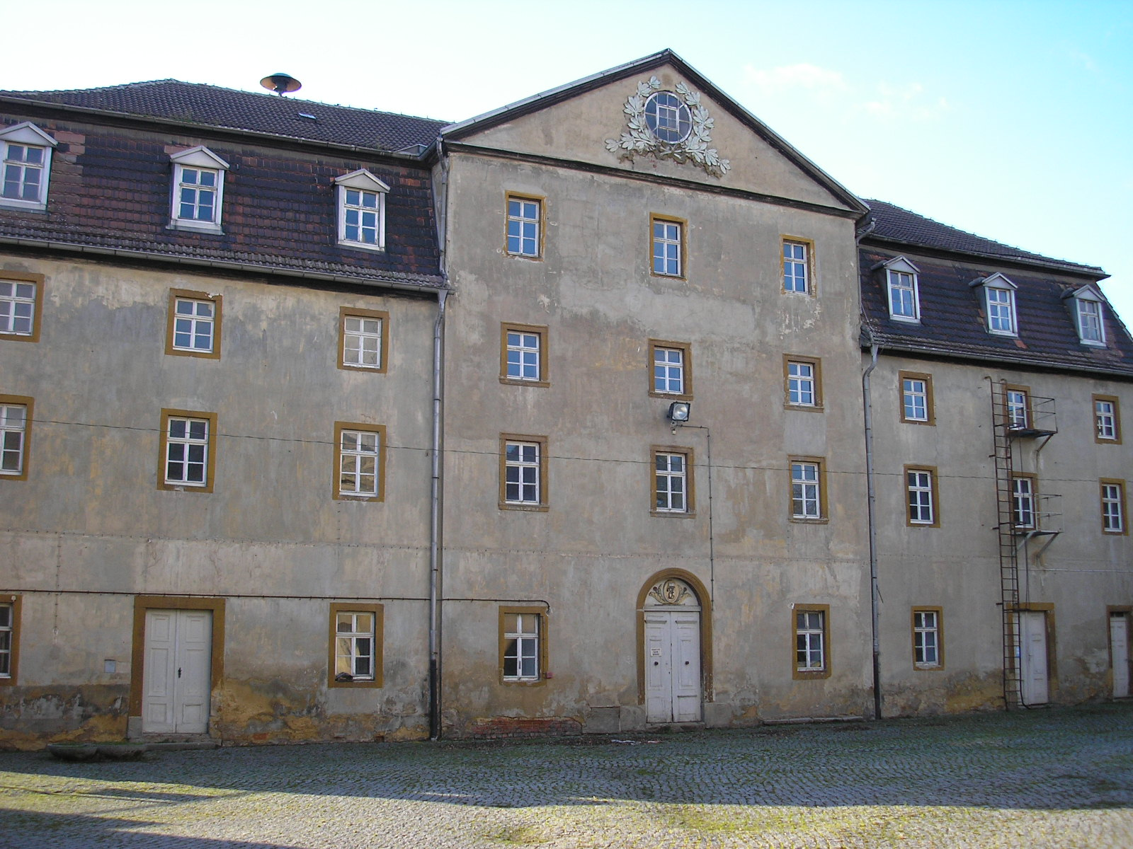 Schloss Crossen (Thüringen).